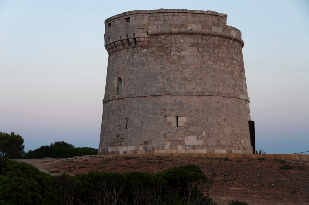 Torre de Son Ganxo (Sant Lluís)